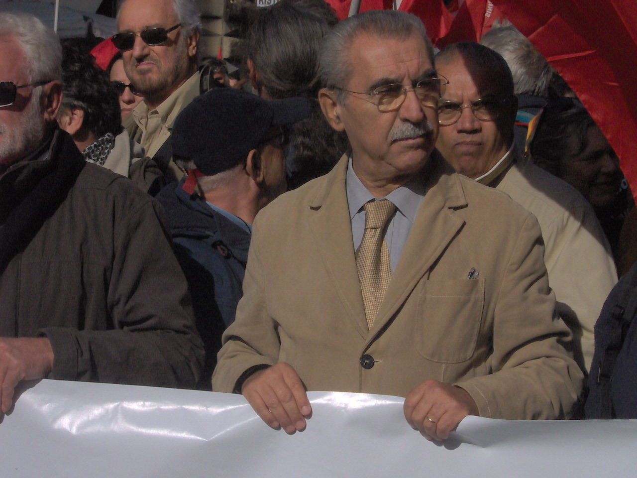 Giulietto Chiesa alla manifestazione a Roma - "Manifestiamoci"